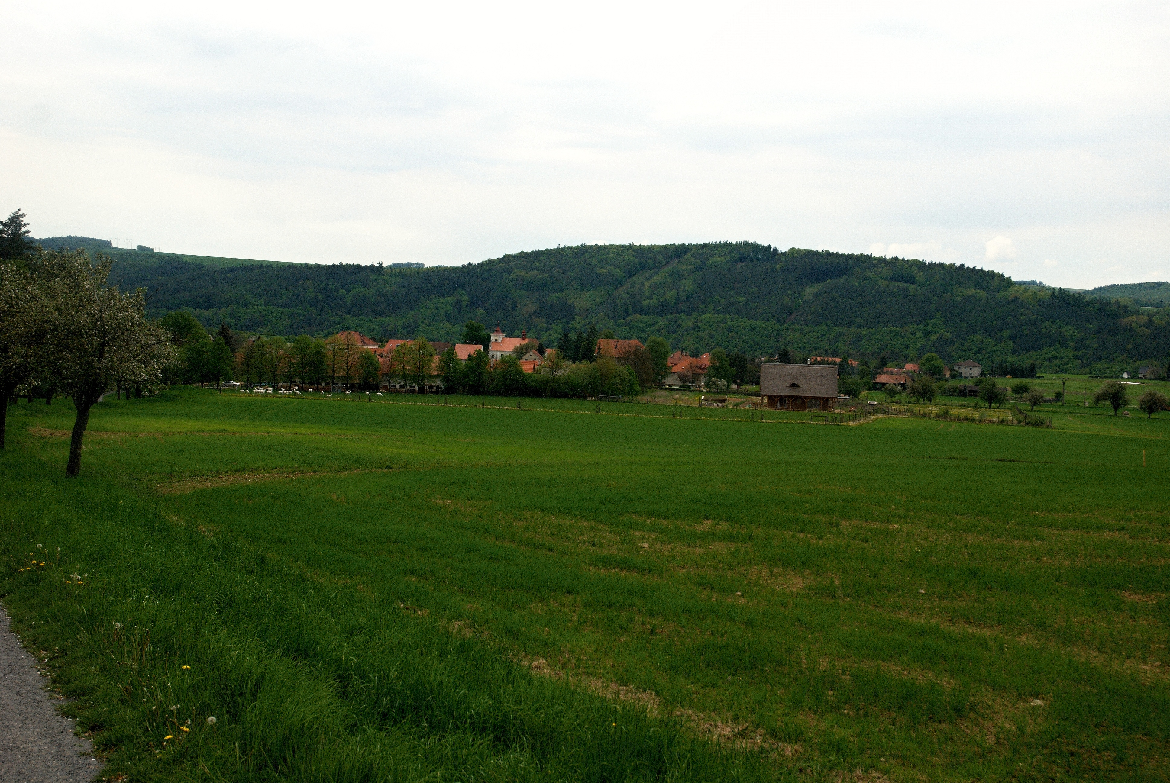 Celkový pohled na ves z jihu